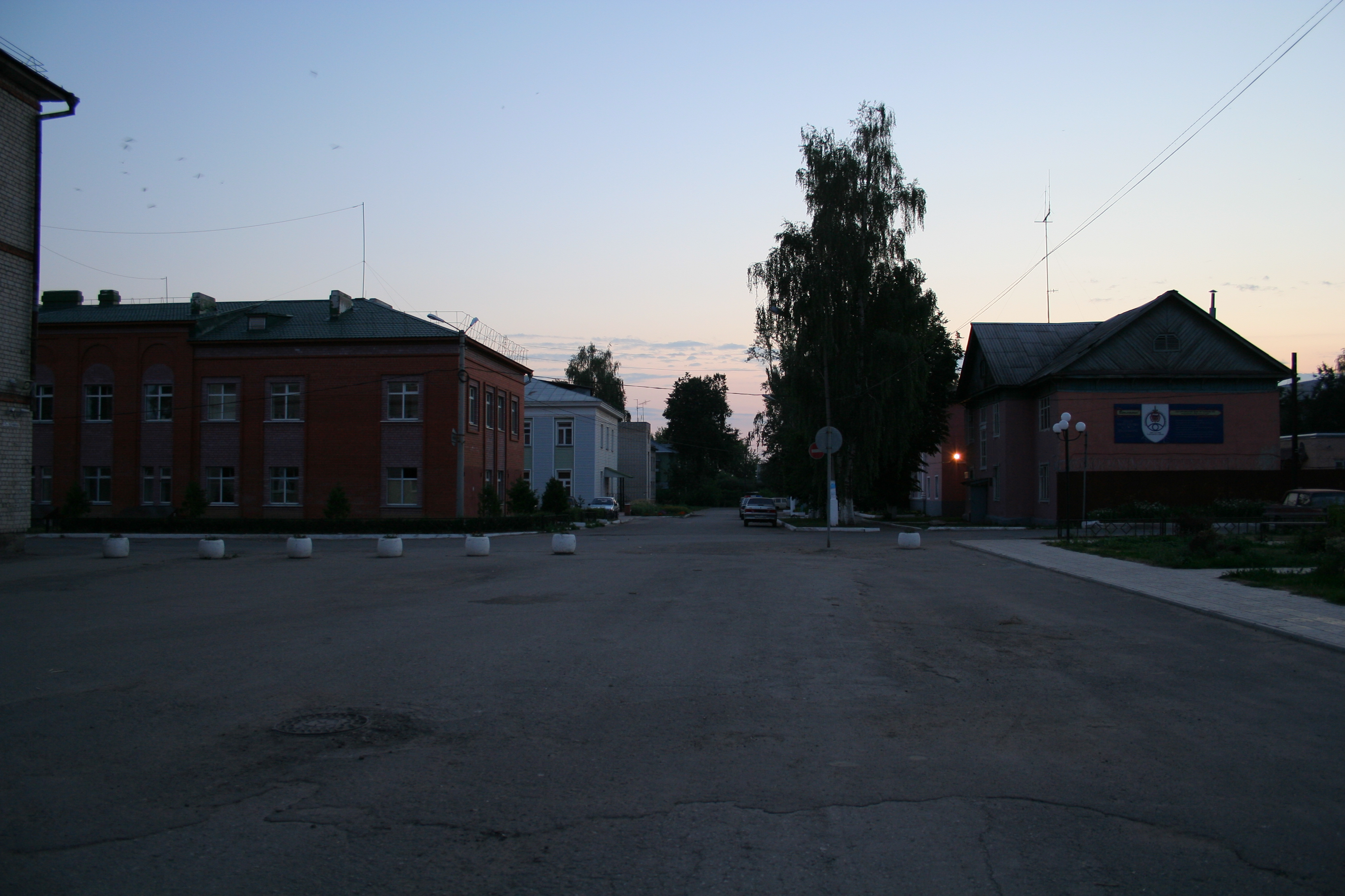 Stadt Rybnoje (Oblast Rjasan, Russland). Stadtzentrum, Leninplatz.